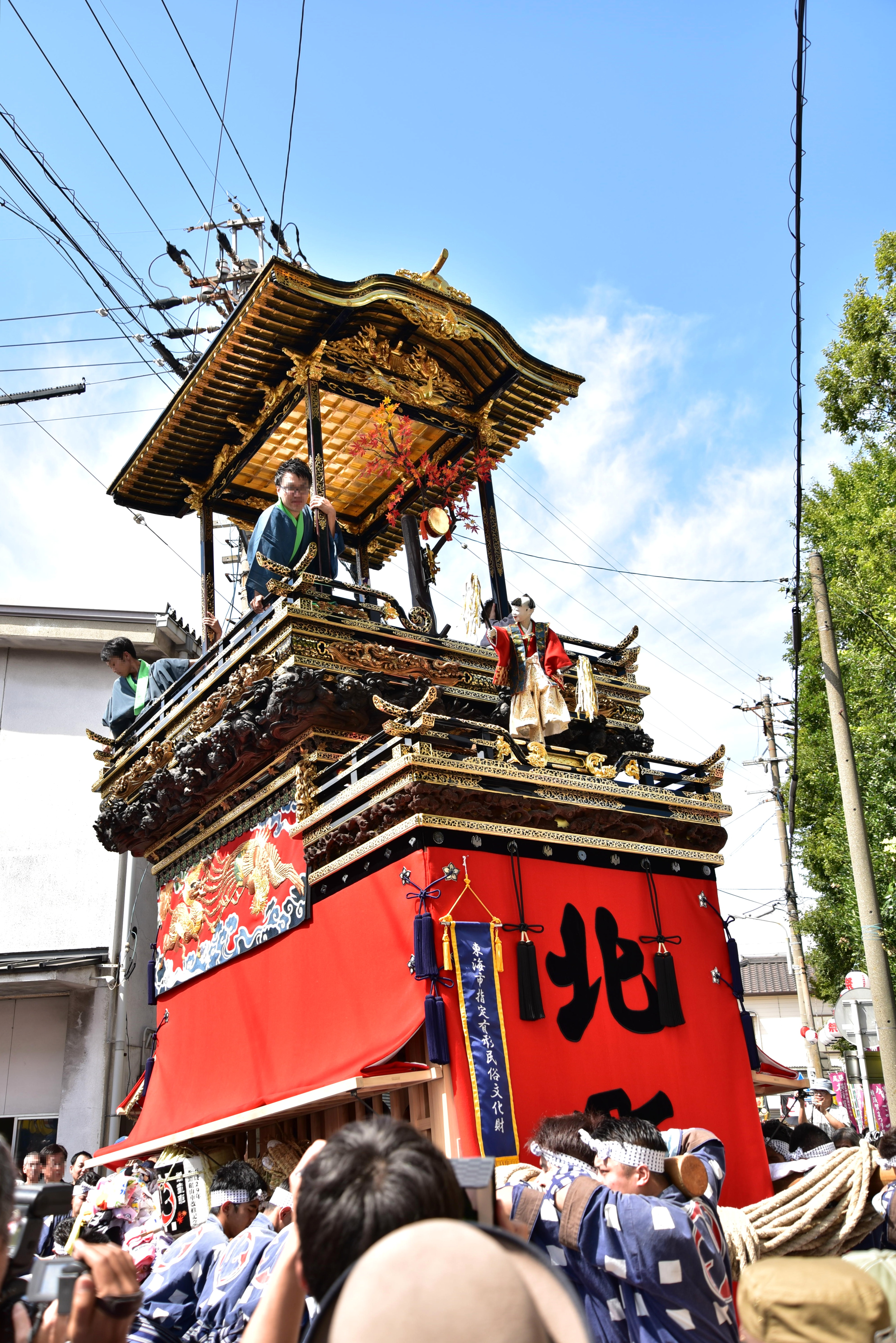 尾張横須賀まつり